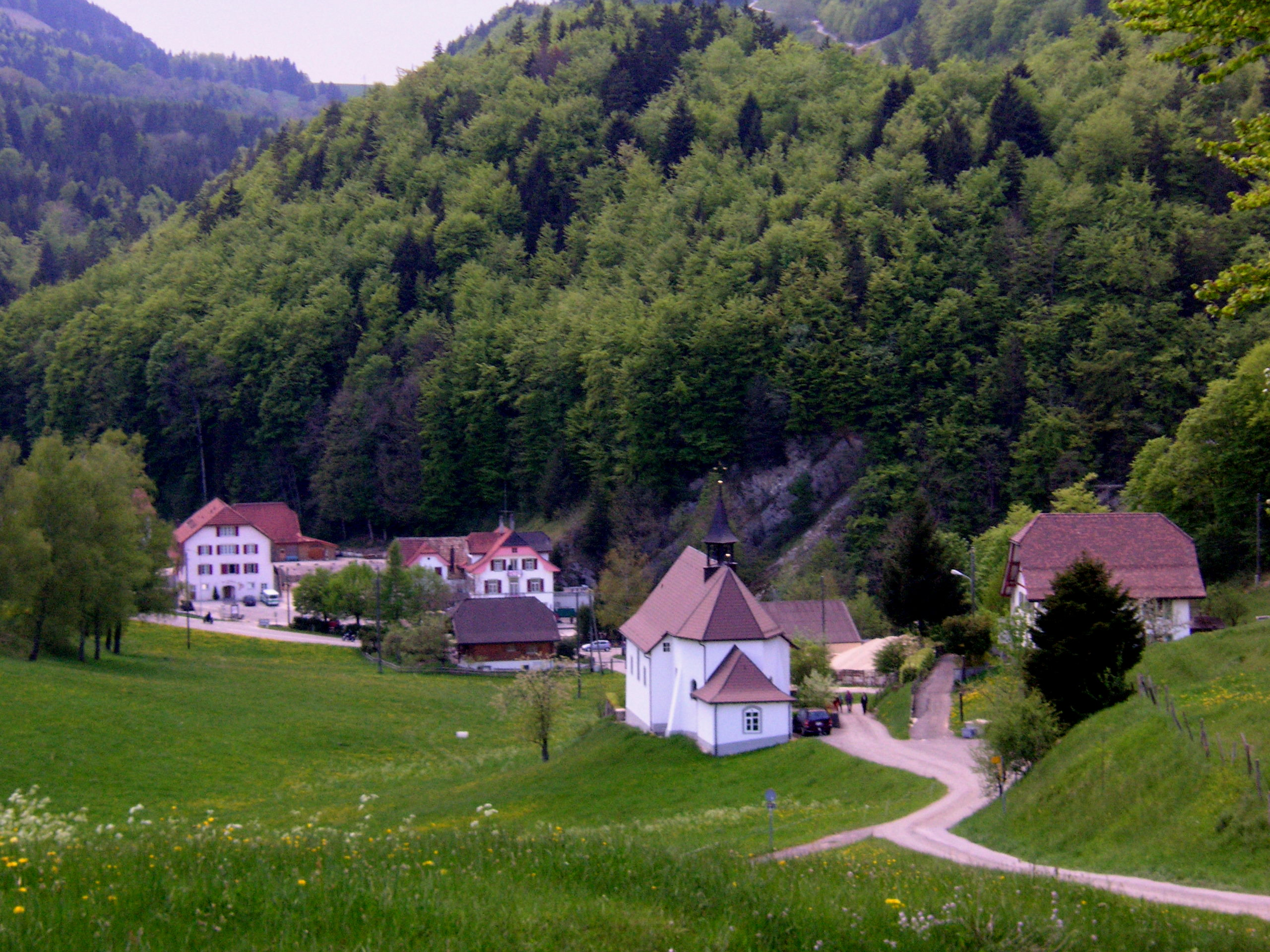 Gaensbrunnen Solothurn im Tal